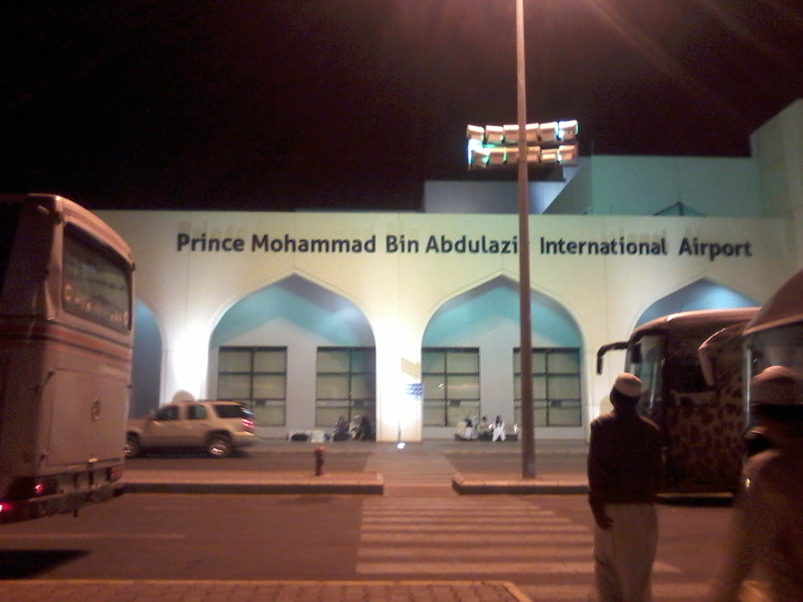 Terminal Lama Bandar Udara Internasional Pangeran Muhammad bin Abdul Aziz Madinah